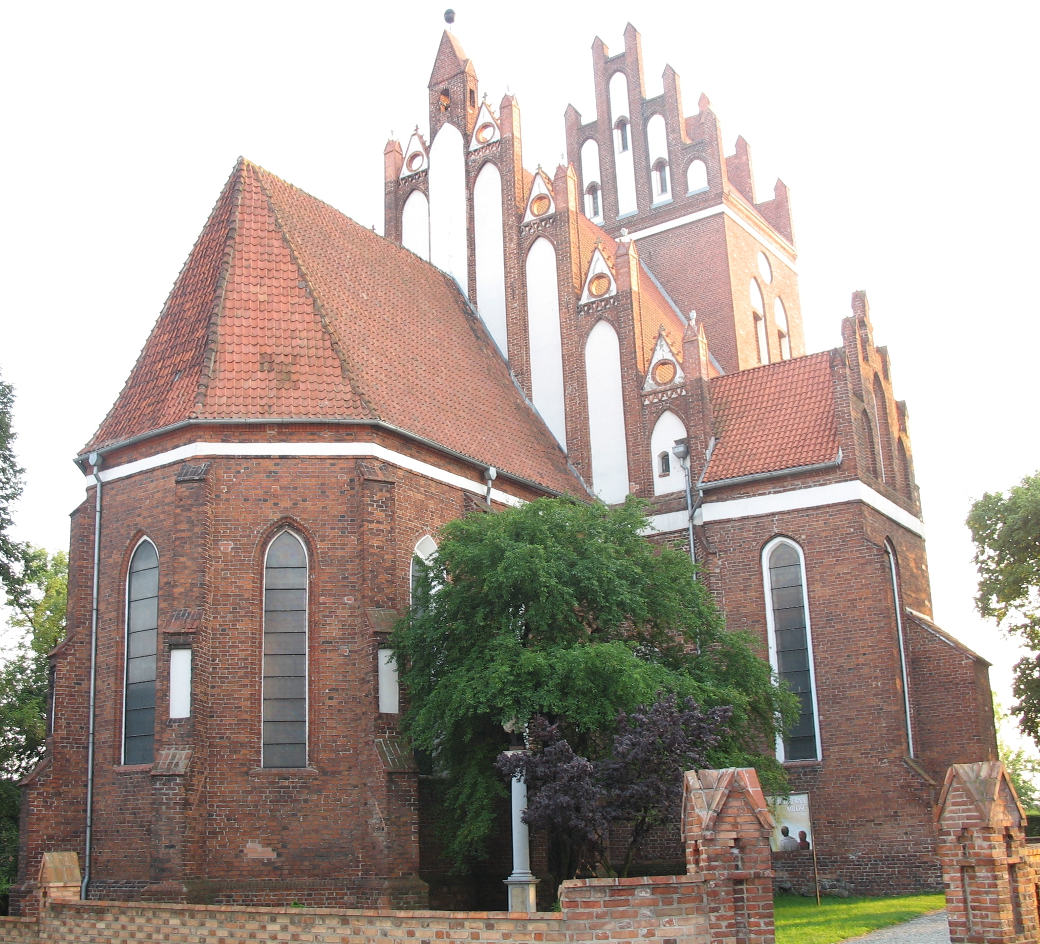 Kościół pw. św. Mikołaja w Gniewie